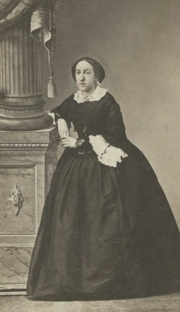 Фюсина (Фьюзен) Софья Юрьевна, урожд. княжна Трубецкая (1836— ?)